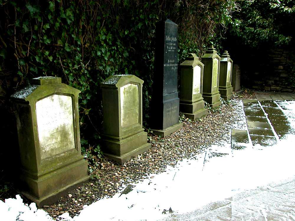 Ehemalige Stifts, heute evangelische Pfarrkirche von Herdecke. Die Grabsteine